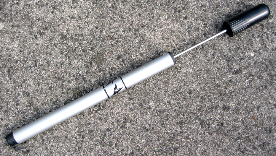 Luftpumpe fürs Fahrrad (bicycle pump)